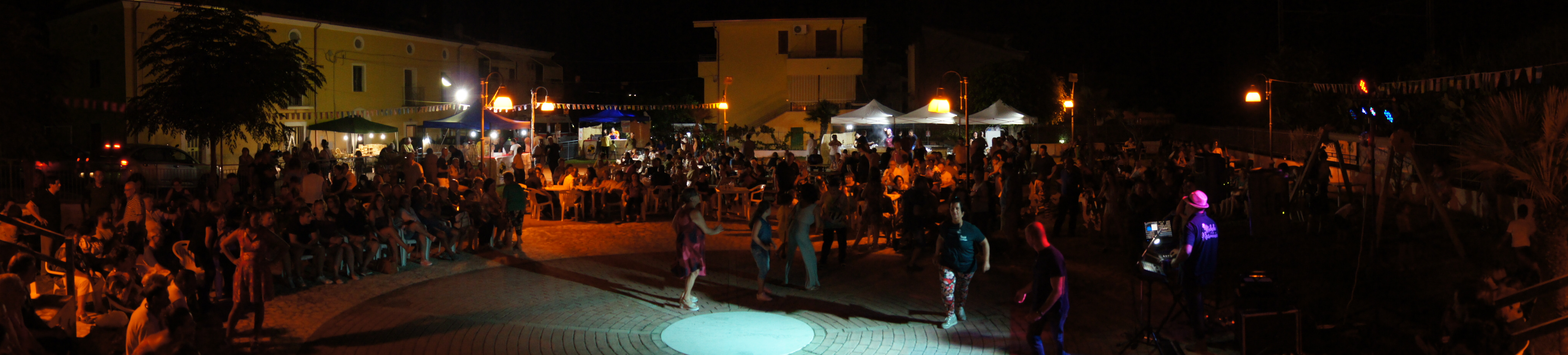 una veduta notturna di Coreca dalla Piazza Principale del Borgo con modalità panoramica